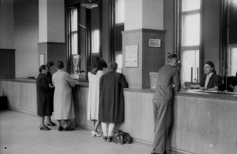 Foto: Halle. Bank- und Sparkassenbetrieb in Halle nach der Währungsreform im Westen. Auch am Montag, dem 24.6. war der Kassenbetrieb in Halle überall normal. U.B.: Eine Filiale der Sparkasse während der Schalterstunden. Foto: Paalzow, Halle -SNB